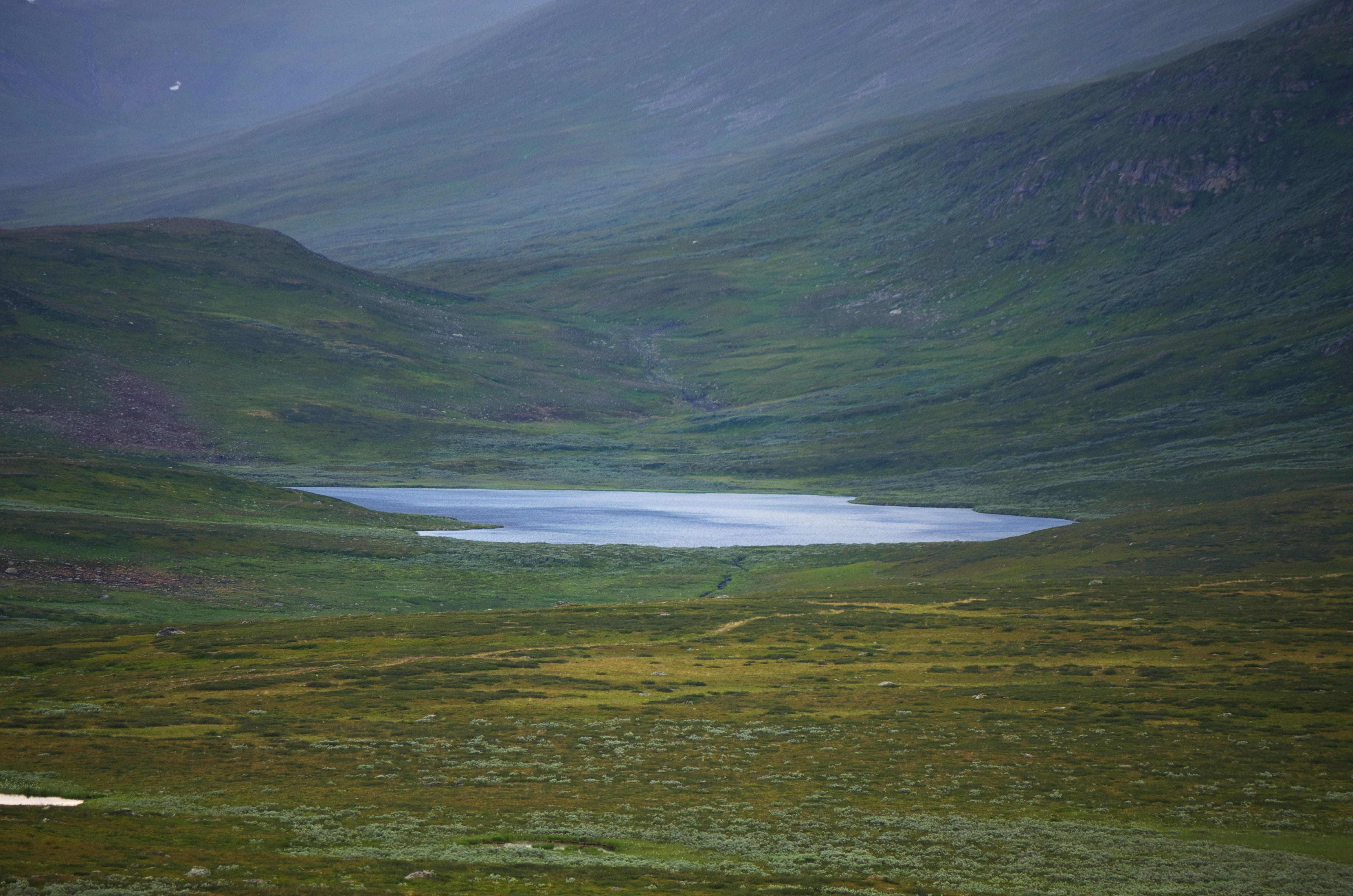 Raksjauratje eller (Ráksjávrátje) är en sjö i Sorsele kommun i Lappland. Kungsleden passerar sjön.